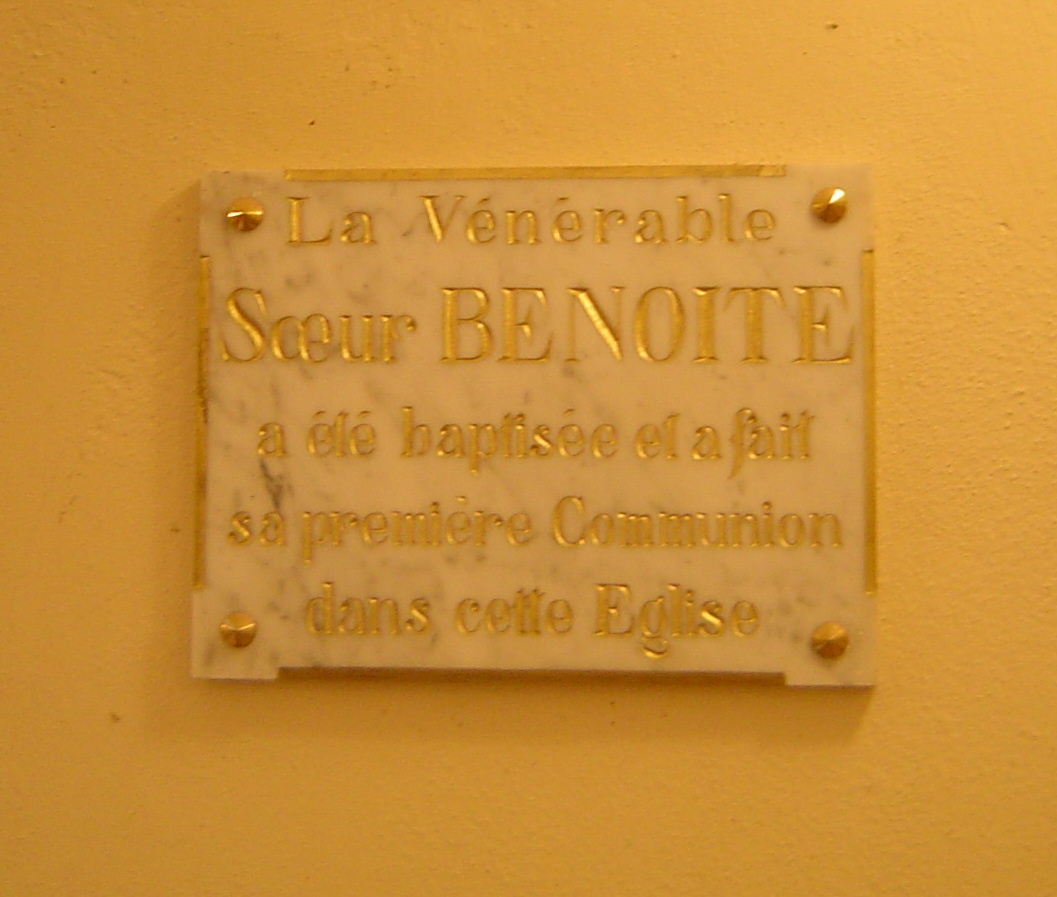 Photo prise à Saint-Étienne-le-Laus. Plaque évoquant Benoîte Rencurel